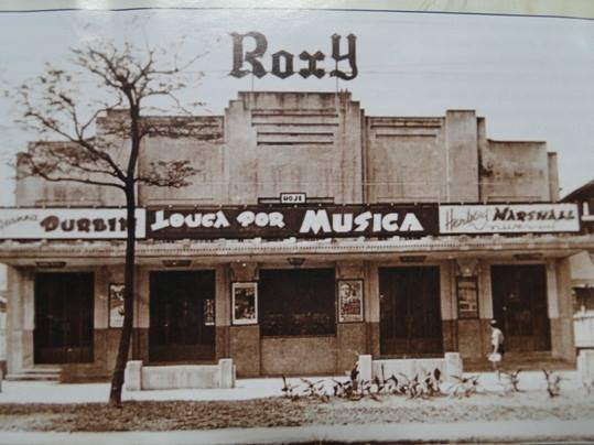 Cinema Roxy, de Santos, quando da sua inauguração em 1934